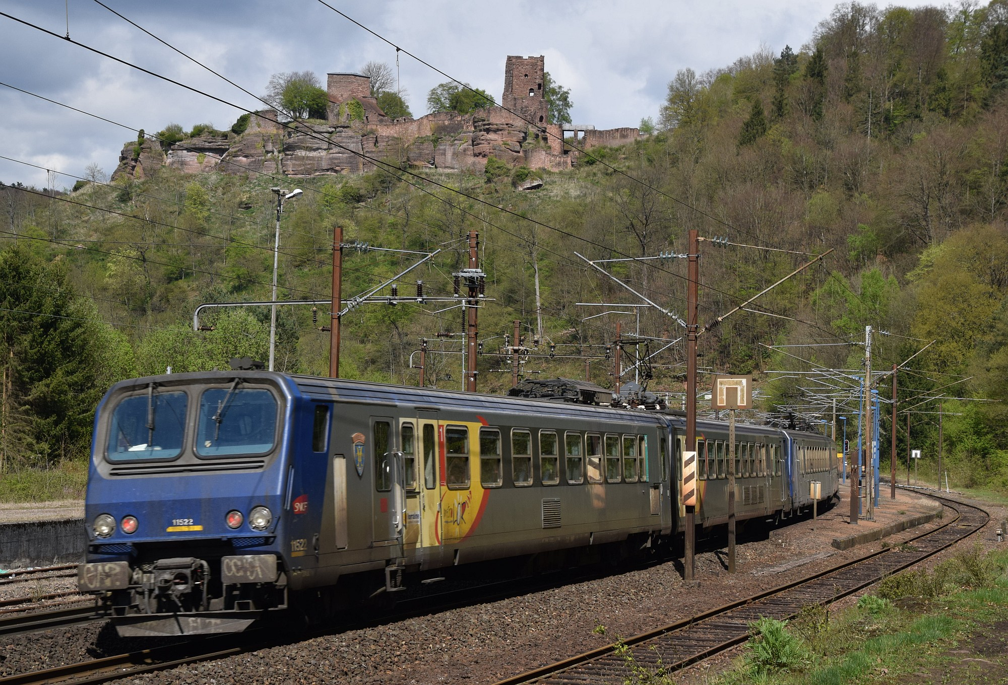 Z2 Triebwagen Z 11522 und Z 11507 der SNCF in Doppeltraktion im Bahnhof Lutzelbourg auf der Strecke Paris-Est - Strasbourg